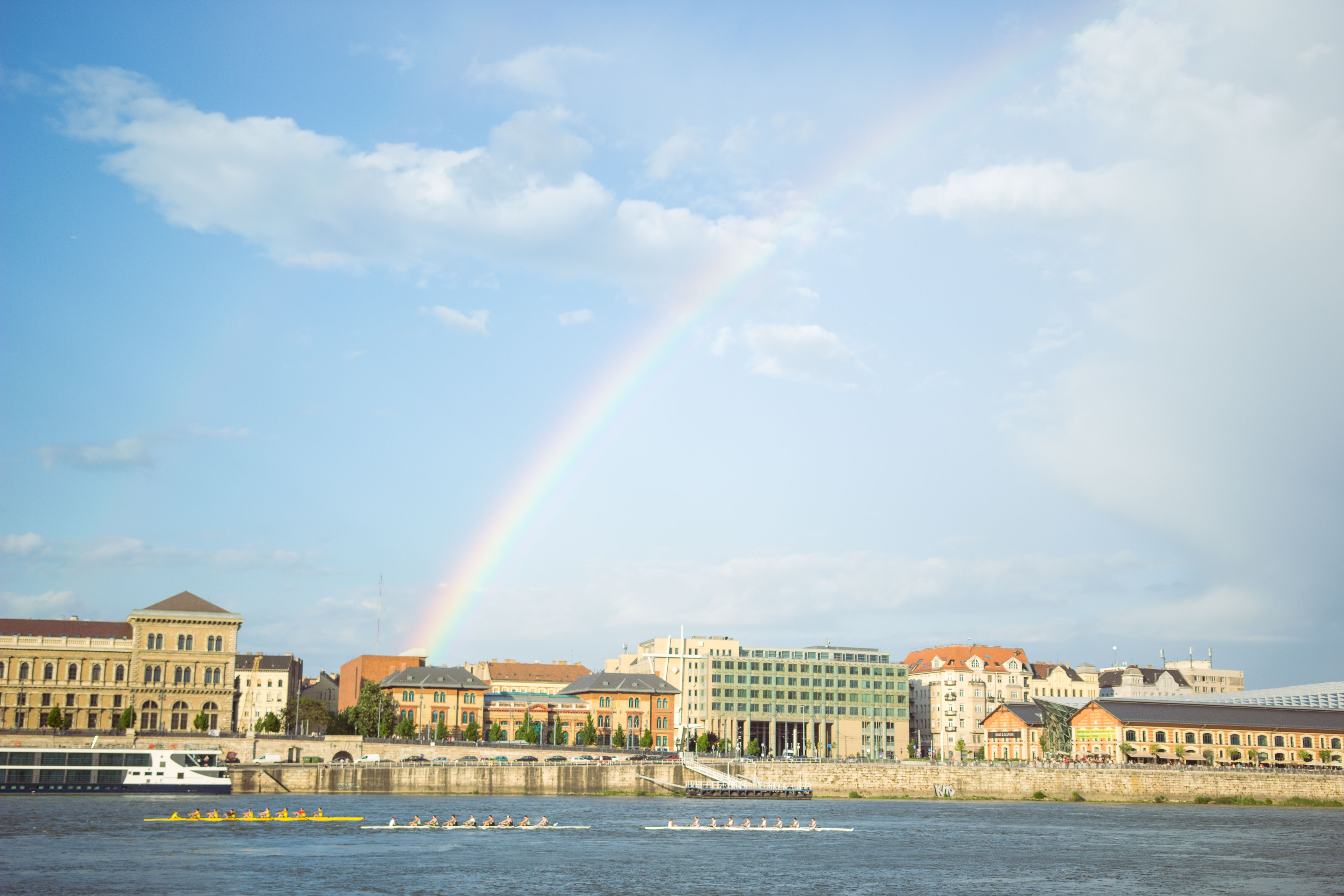 Dunai Regatta 2016 - evezős döntő (fotó: Biró Dávid)